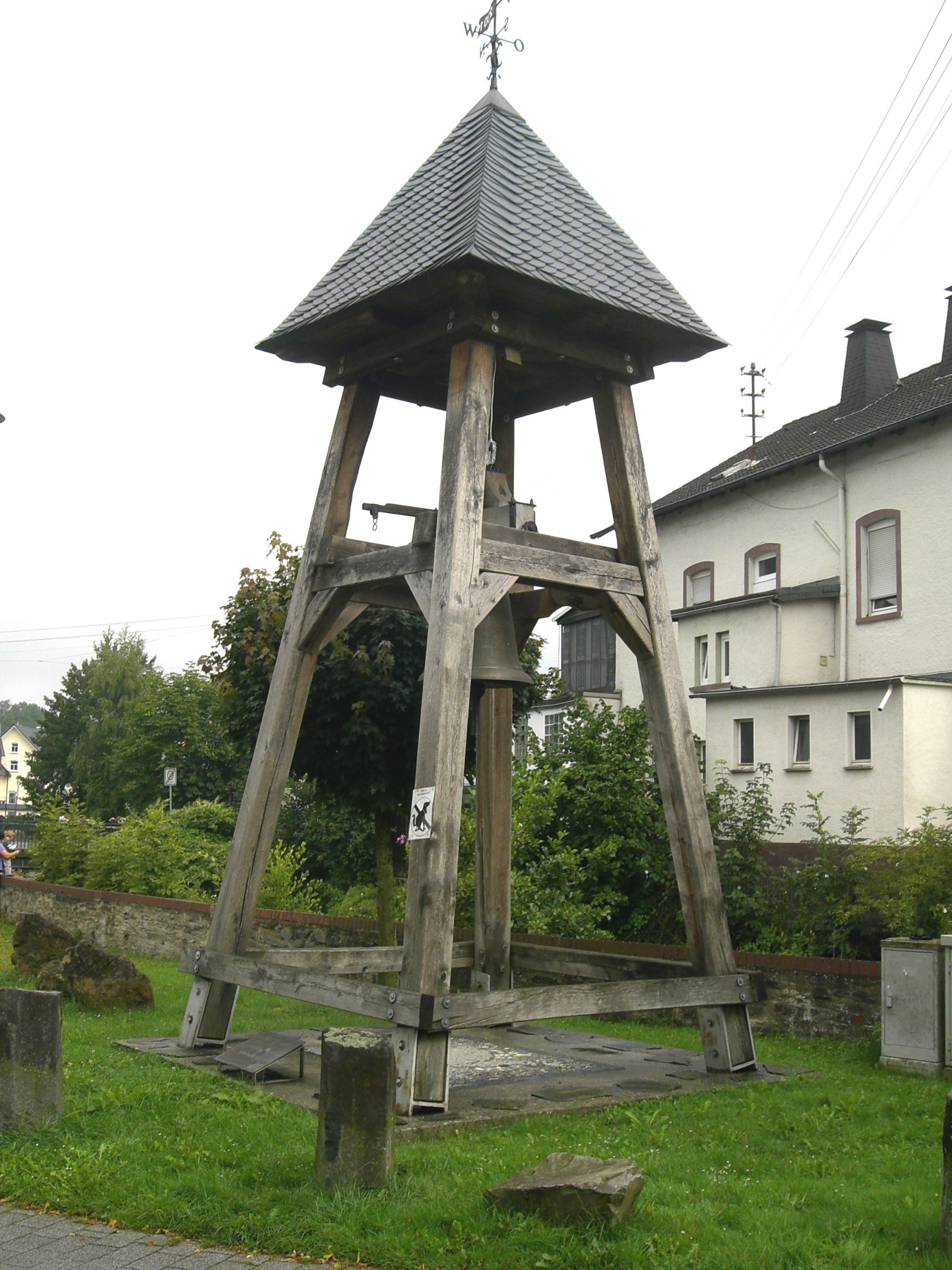 bekannte Grevenbrücker Skulptur Schweineglocke